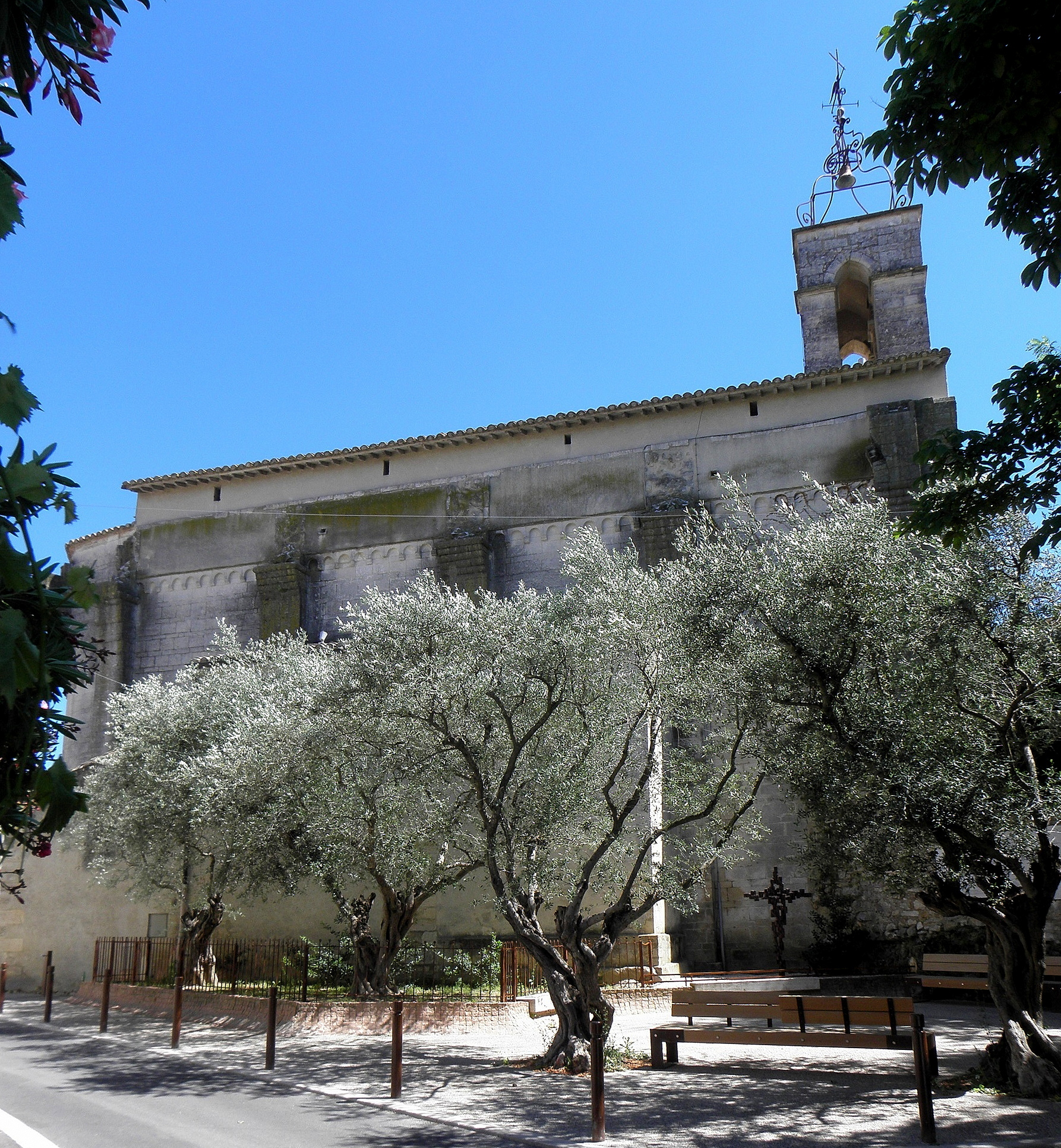 Église Saint-Jean-Baptiste de Castelnau-le-Lez (34). Flanc nord.